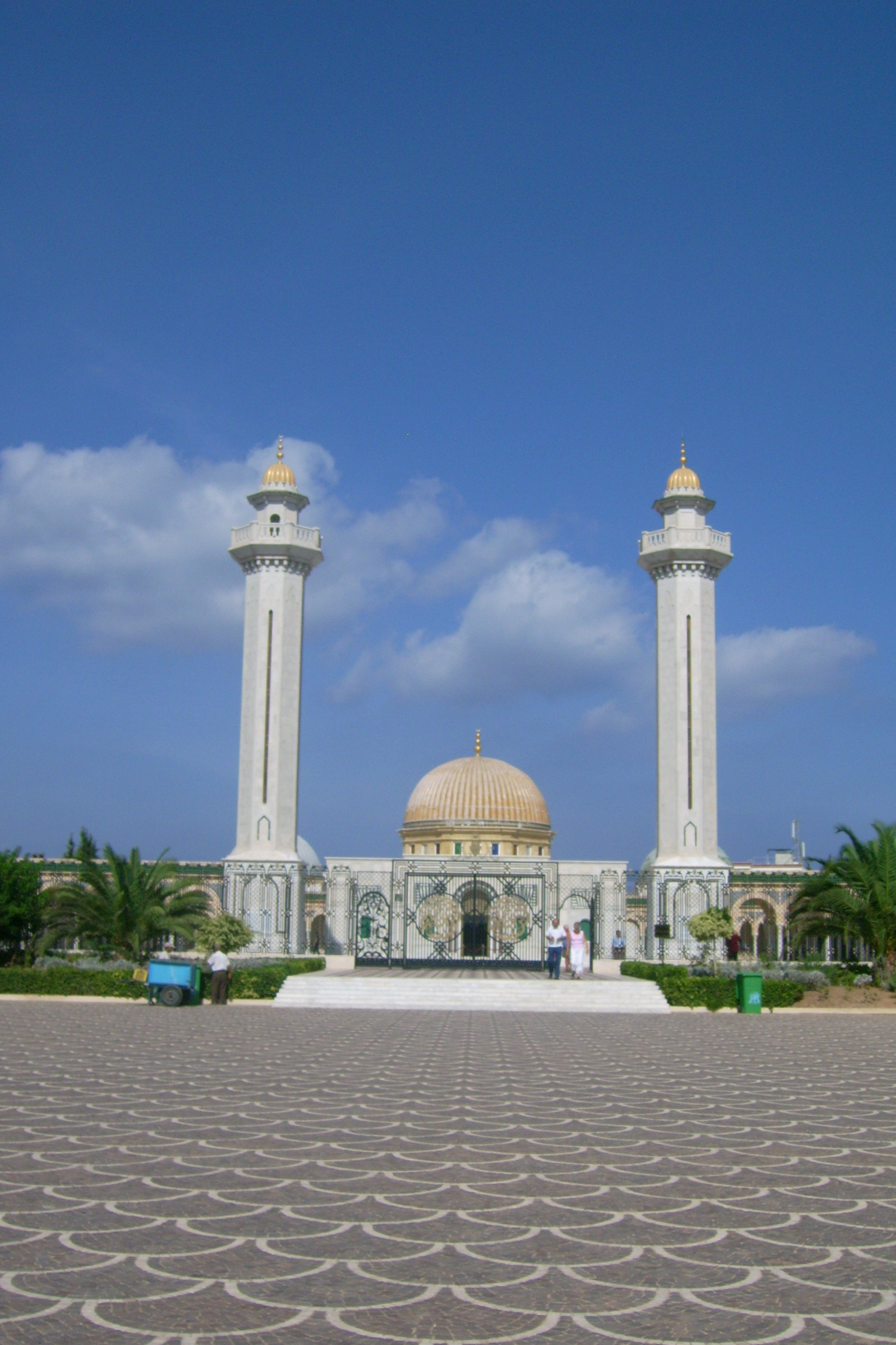 Mauzoleum Bourgiby w Monastirze, Tunezja/Bourguiba's mausoleum in Monastir (Tunisia)